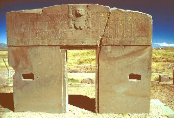 La Portada del Sol, es un vestigio cultural que forma parte de la cultura Tiahuanako